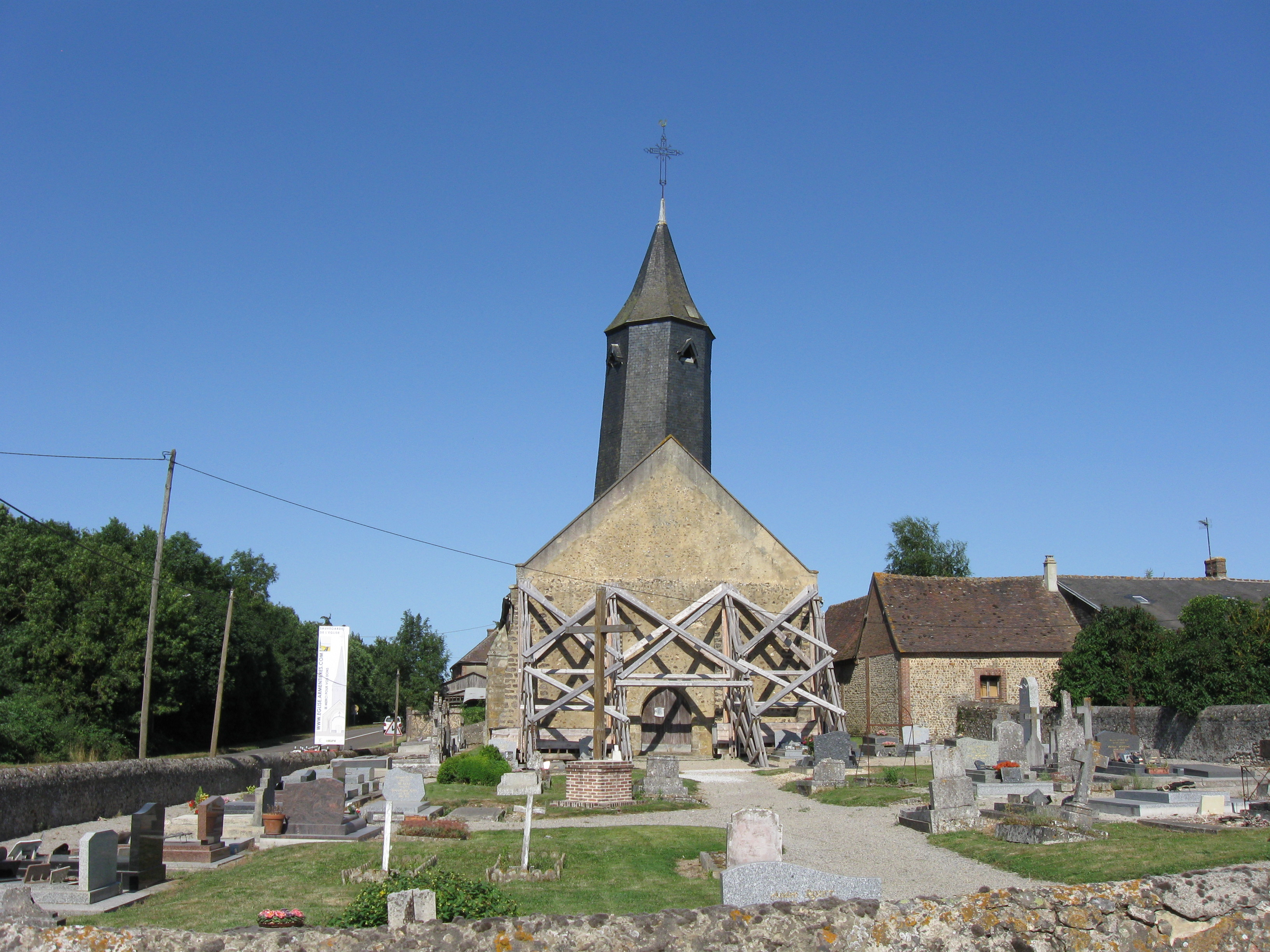 Église Saint-Martin d'Armentières-sur-Avre. (département de l'Eure, région Haute-Normandie).